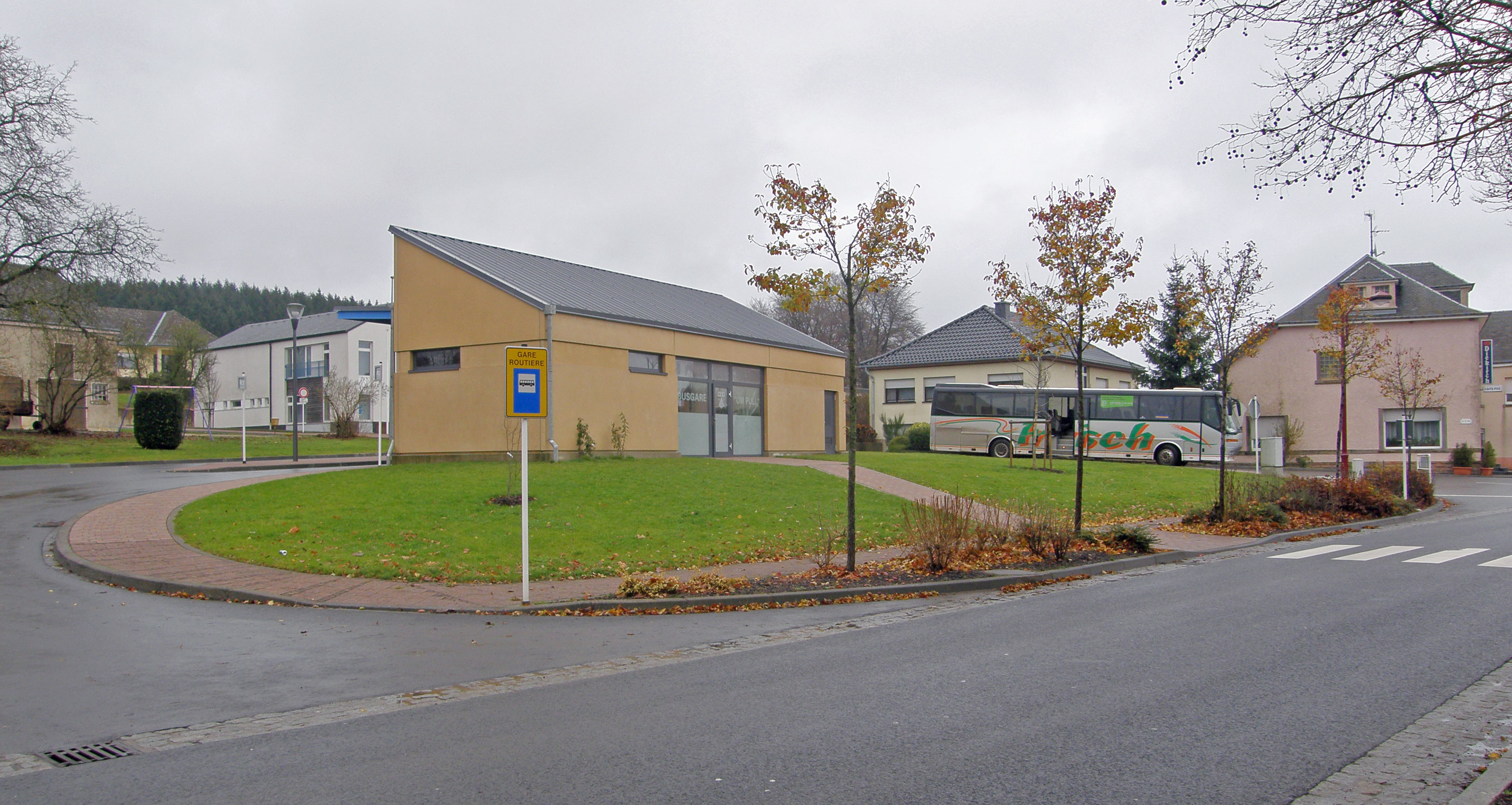 Busgare zu Rammerech.